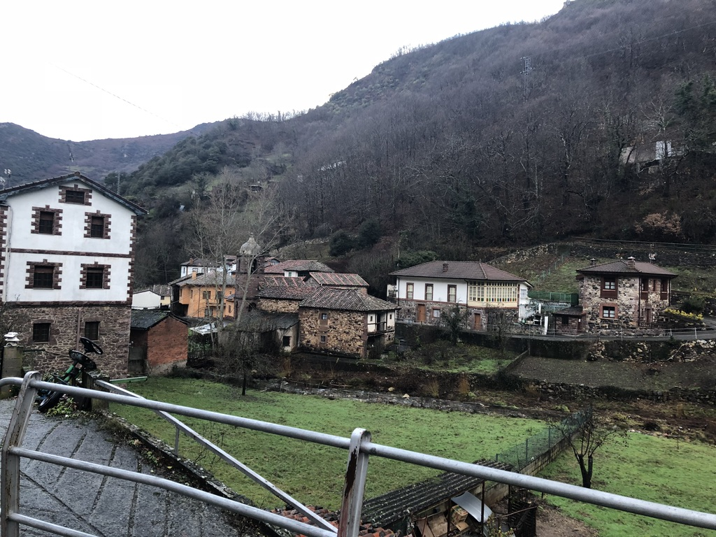 Fotografía de la La Riera de Somiedo Principado de Asturias (España) La Senda del oso.